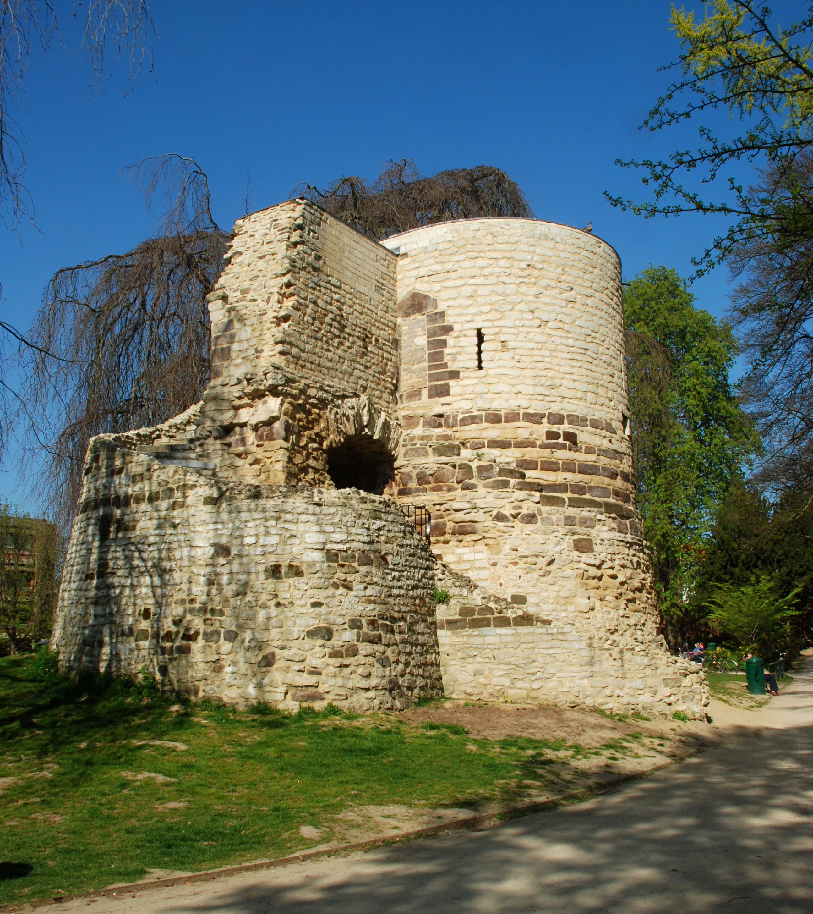 Belgique - Brabant flamand - Première enceinte de Louvain - Parc Saint-Donat - tour ouest